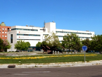 El conservatorio de música Victoria de los Ángeles y el conservatorio de danza Carmen Amaya en el barrio de Los Rosales, Madrid.